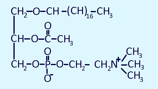 Factor activador de plaquetes